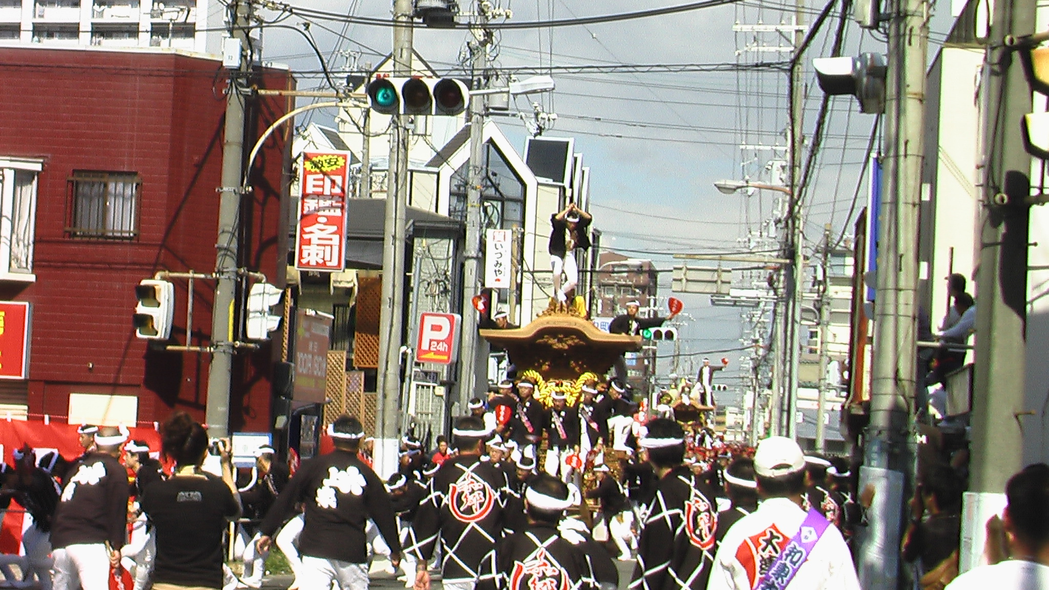 投稿者自身が大阪府和泉市で開催された『和泉だんじり祭』を和泉府中で撮影。